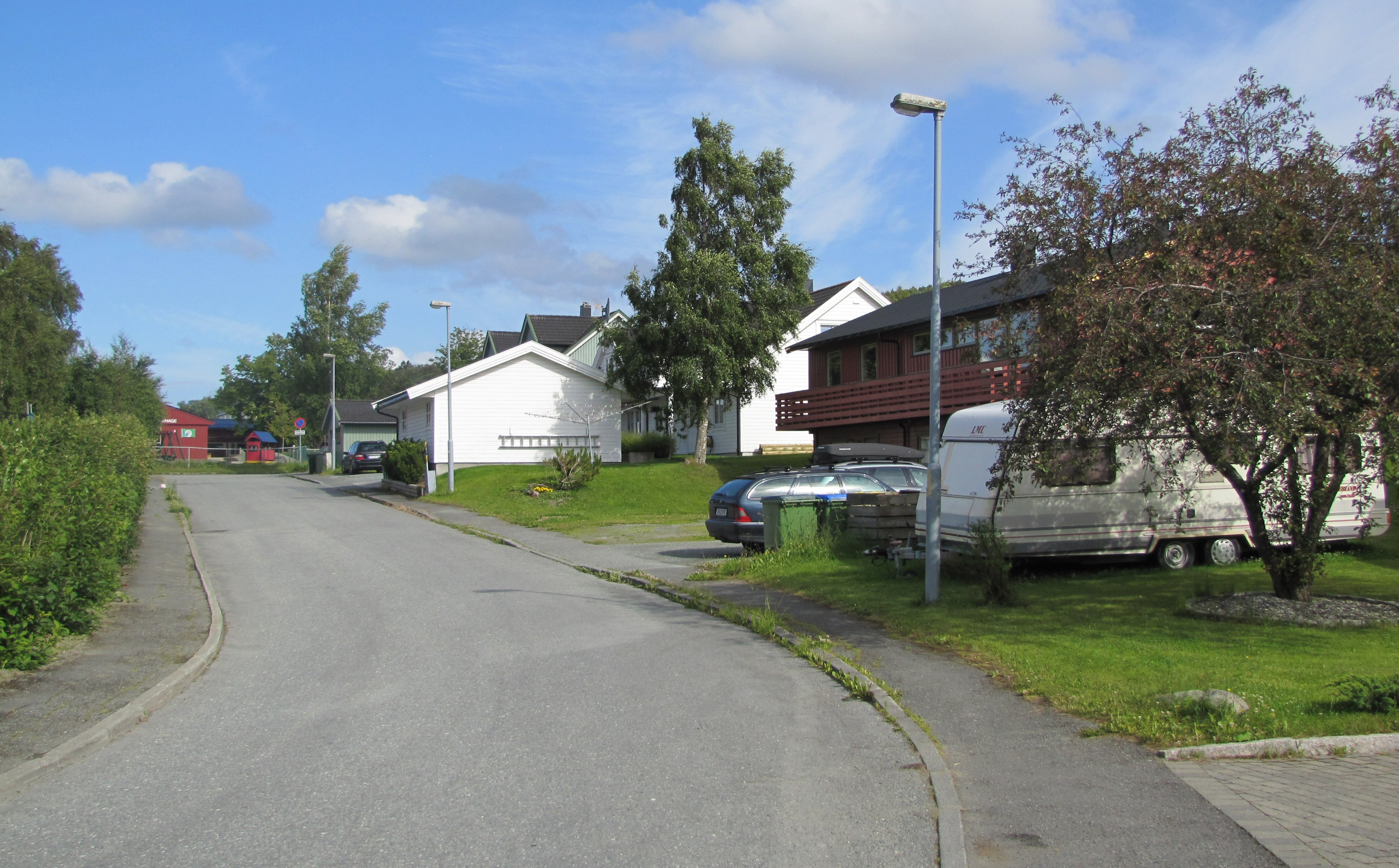 Åsvangvegen, Trondheim